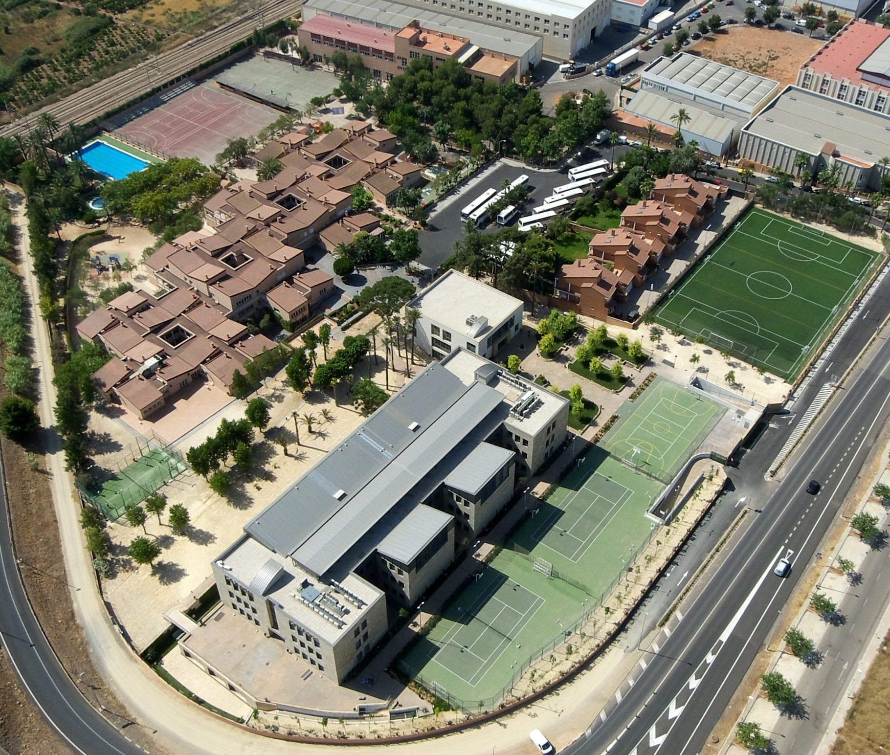 Vistas aéreas de las instalaciones de Caxton College